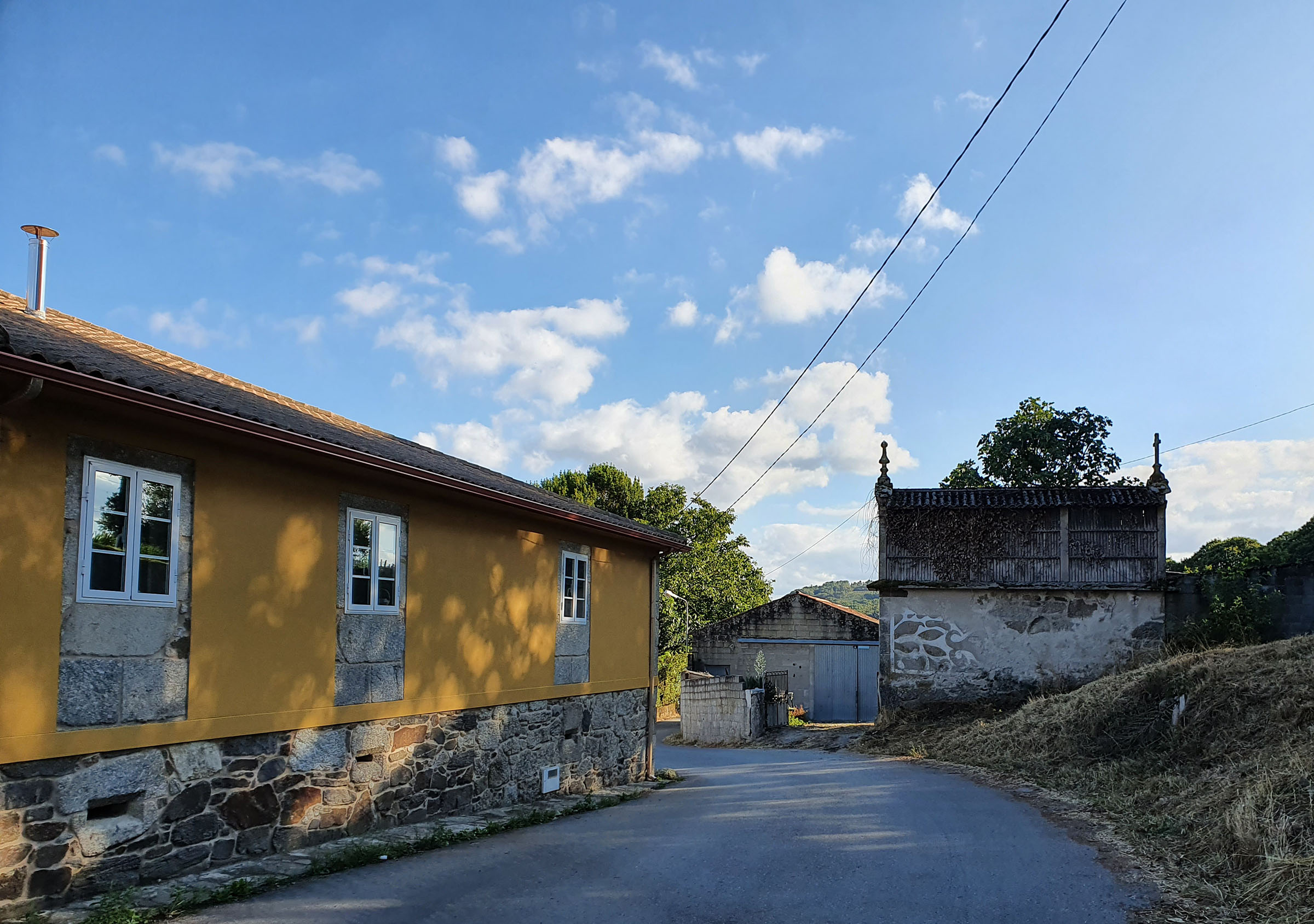 Sendín, lugar da parroquia de Olveda no Concello de Antas de Ulla. Aínda que eclesiásticamente pertence a unha parroquia do Concello de Antas de Ulla, o lugar de Sendín forma parte do de Monterroso.